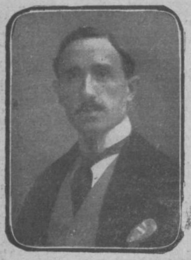 D. Vicente Gay, de Kaulak